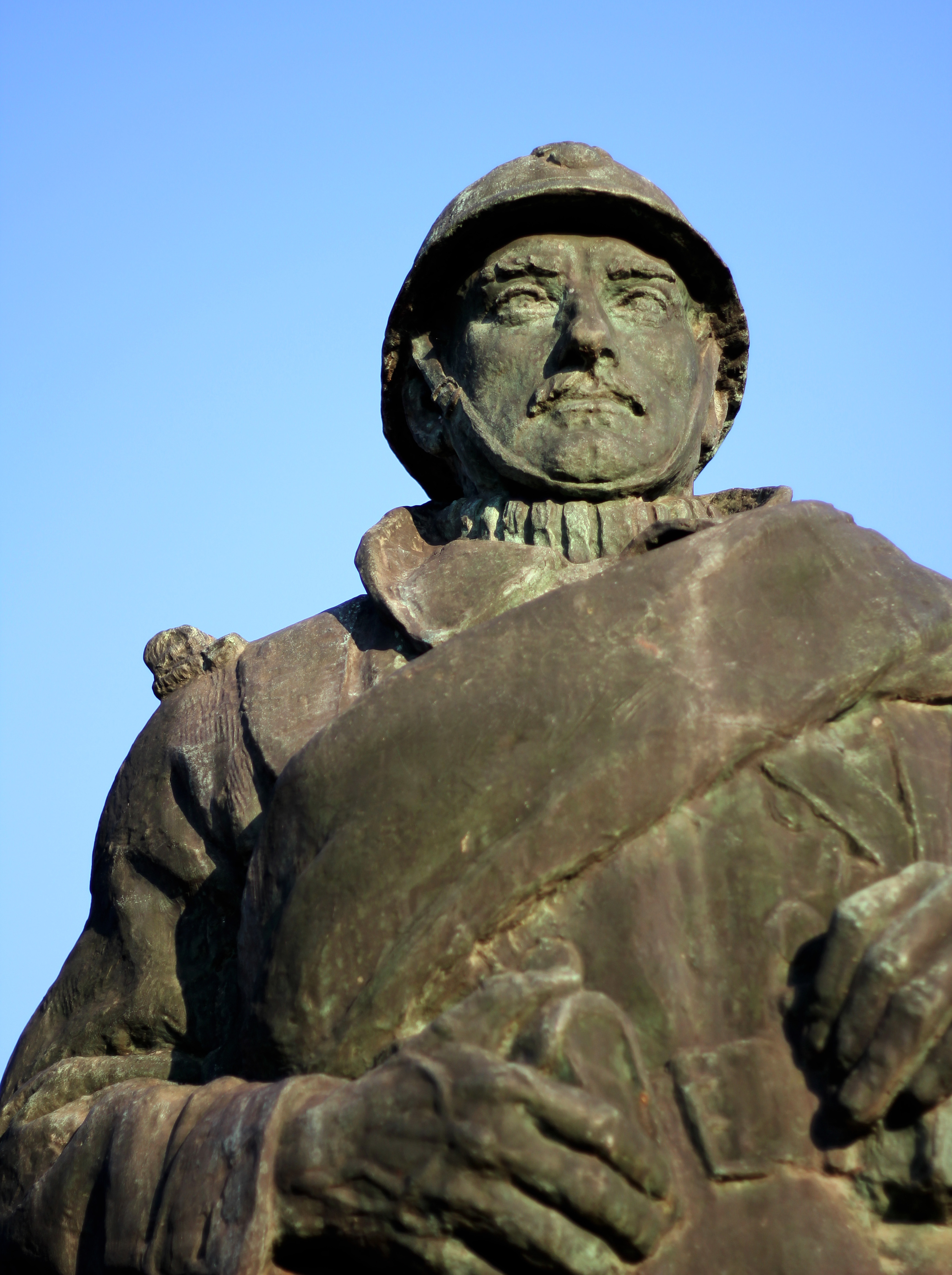 Sculpture "Le poilu libérateur". Esplanade de Metz (France)